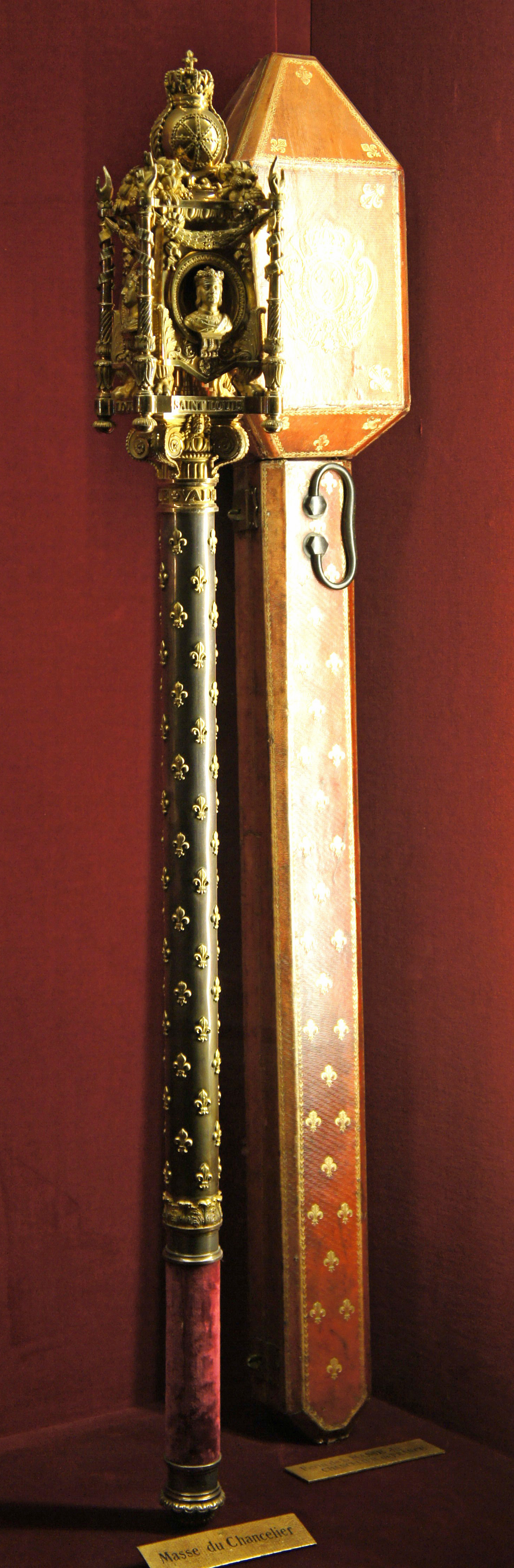 Masse de chancelier utilisé pour le sacre de Charles X (1825)